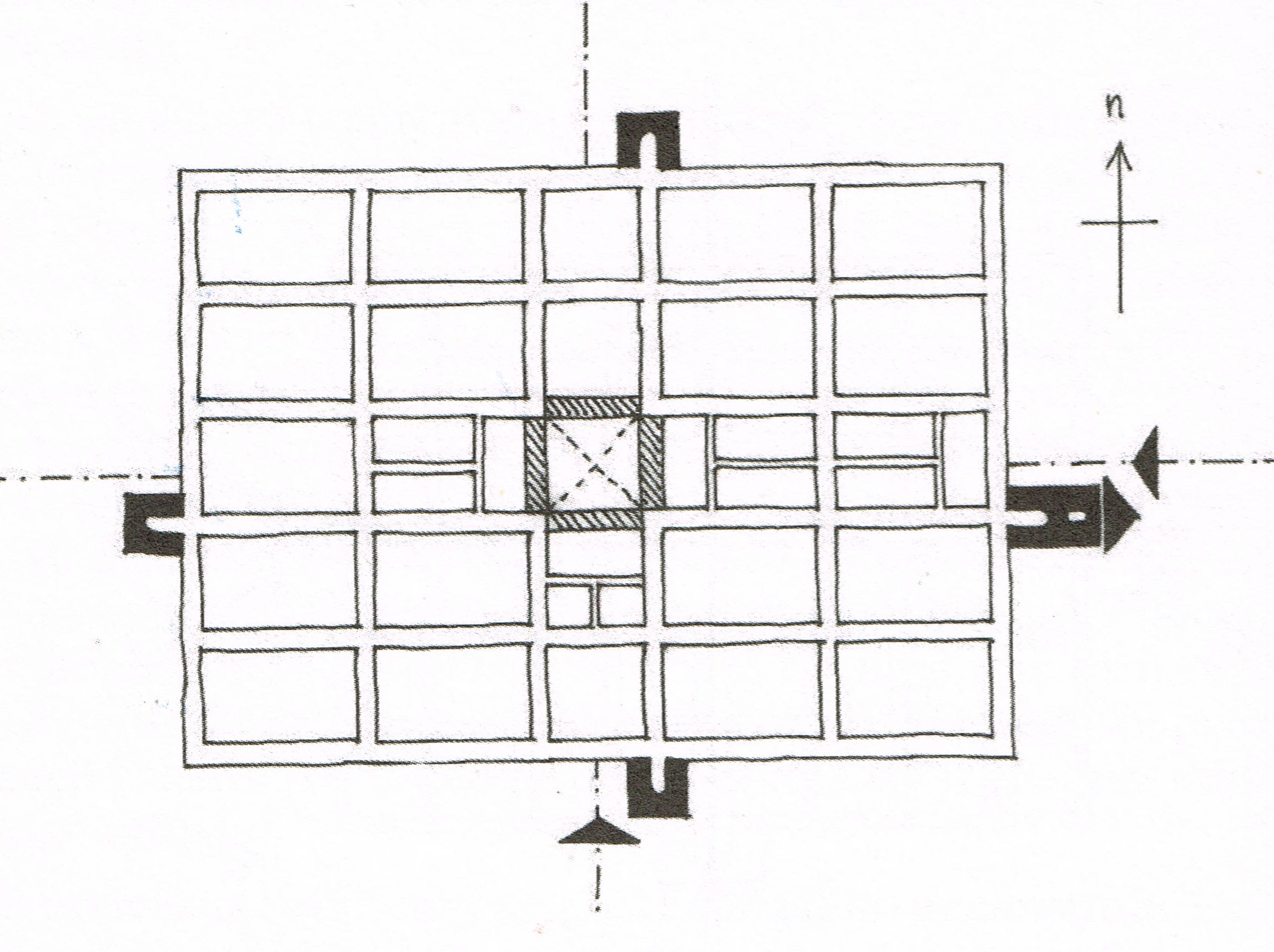 Pattern of french bastide city Plan masse type d'une bastide française